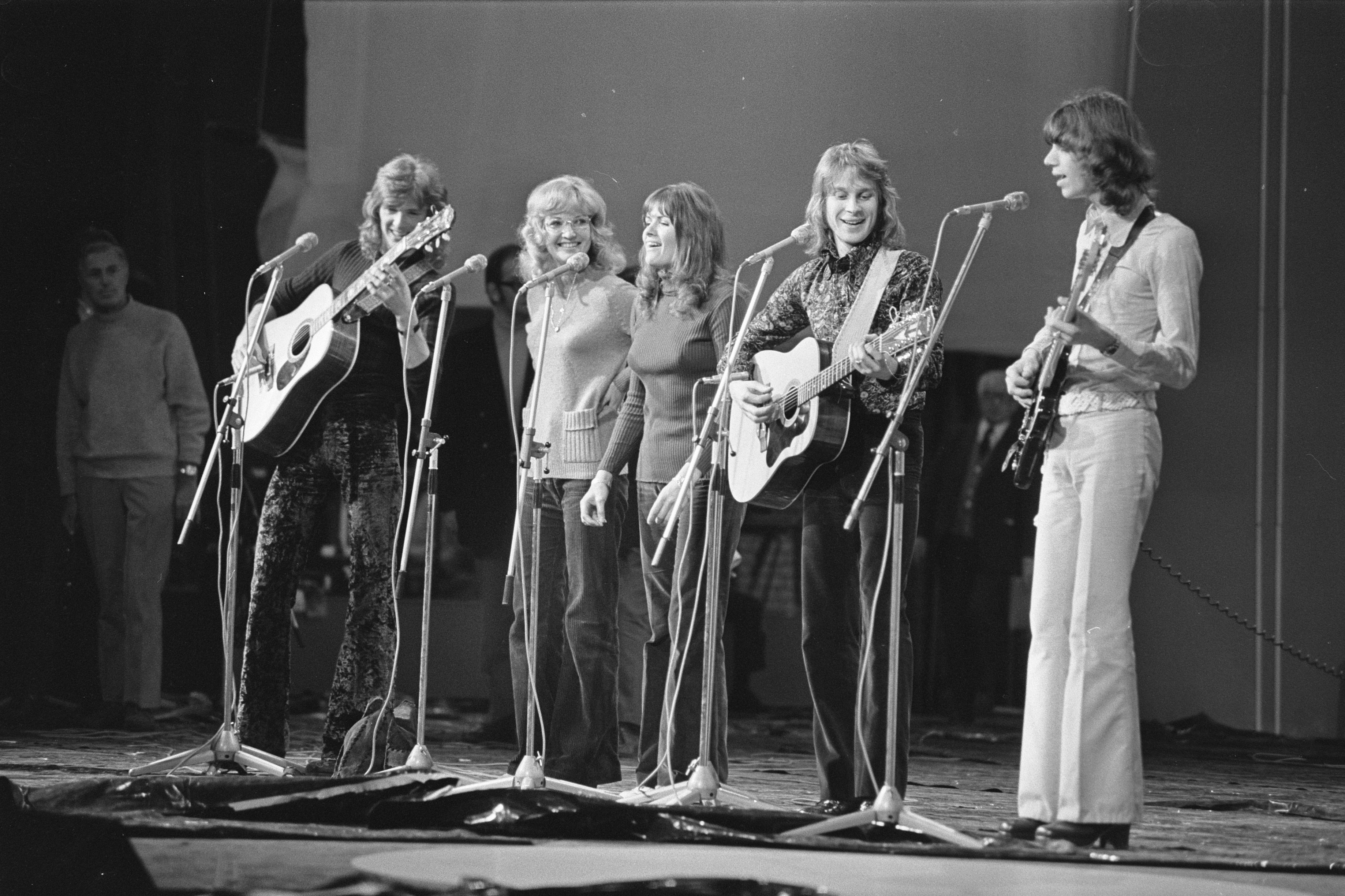 The New Seekers tijdens repetities voor het Grand Gala du Disque Populaire 1972